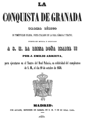 Portada del libreto de La Conquista de Granada